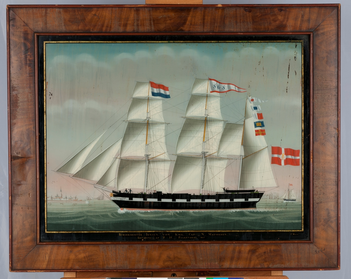 Barken Bürgermeister Jensen av Kiel